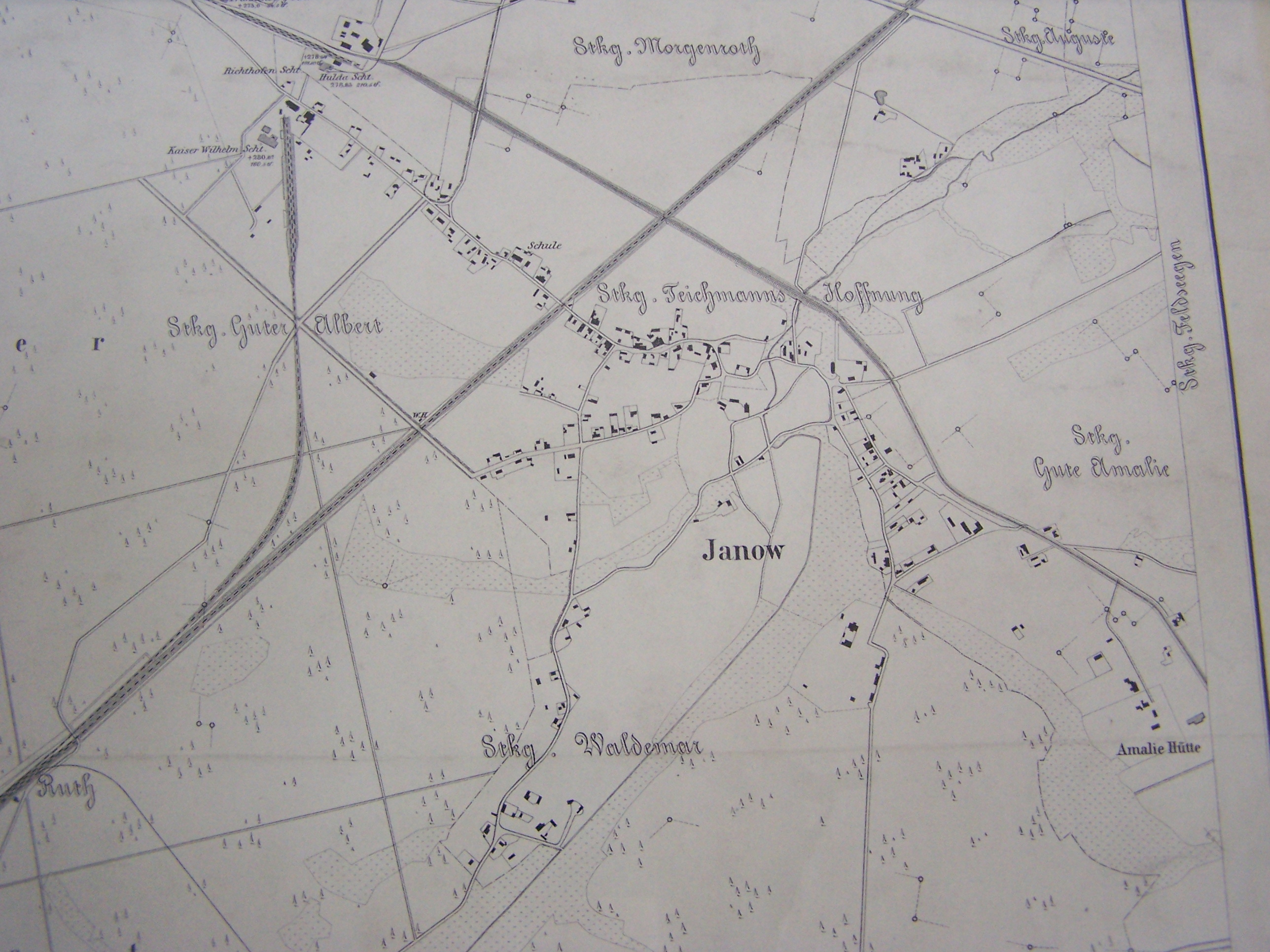 Fragment starego niemieckiego planu przedstawiający dzielnicę Katowic - Janów. Zdjęcie zrobiono podczas wystawy starych map i planów zorganizowanej przez Archiwum Państwowe w Katowicach.